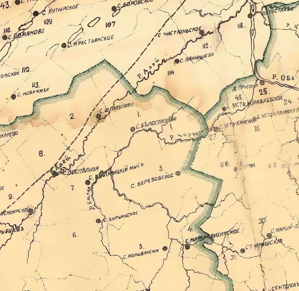 Границы Чарышской волости по состоянию на 1914 год на карте Томской губернии.